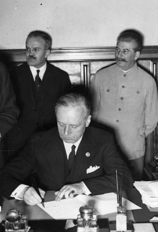 Dtsch.-Sowjet. Grenz- u. Freundschaftsvertrag Scherl: 39137-1 Die Unterzeichnung der Moskauer Vereinbarungen. Reichsminister des Auswärtigen, von Ribbentrop, unterzeichnet im Moskauer Kreml die gemeinsame Erklärung der Reichsregierung und der Sowjet-Regierung und den deutsch-sowjetischen Grenz- und Freundschaftsvertrag. Im Hintergrund Herr Stalin und der sowjetrussische Regierungschef und Aussenkommissar Molotow. 29.9.39-de-me-kä 170 Presse-Hoffmann. ADN-ZB/Archiv: Sowjetunion, August 1939 In Moskau wird am 28.8.1939 zwischen dem Deutschen Reich und der UdSSR ein Grenz- und Freundschaftsvertrag sowie eine gemeinsame politische Erklärung unterzeichnet. Der deutsche Reichsaußenminister Joachim von Ribbentrop während der Unterzeichnung; stehend J.W. Stalin (r.) und der Vorsitzende des Rates der Volkskommissare W.M. Molotow. Aufnahme: Presse-Diffusion Lausanne Abgebildete Personen: Ribbentrop, Joachim von: Außenminister, NSDAP, Deutschland Molotow, Wjatscheslaw Michailowitsch: Außenminister, Sowjetunion (GND 11873461X) Stalin, Josef W.: 1878-1953; Marschall, Vorsitzender des Ministerrates, Generalsekretär der KP, Sowjetunion (GND 118642499)